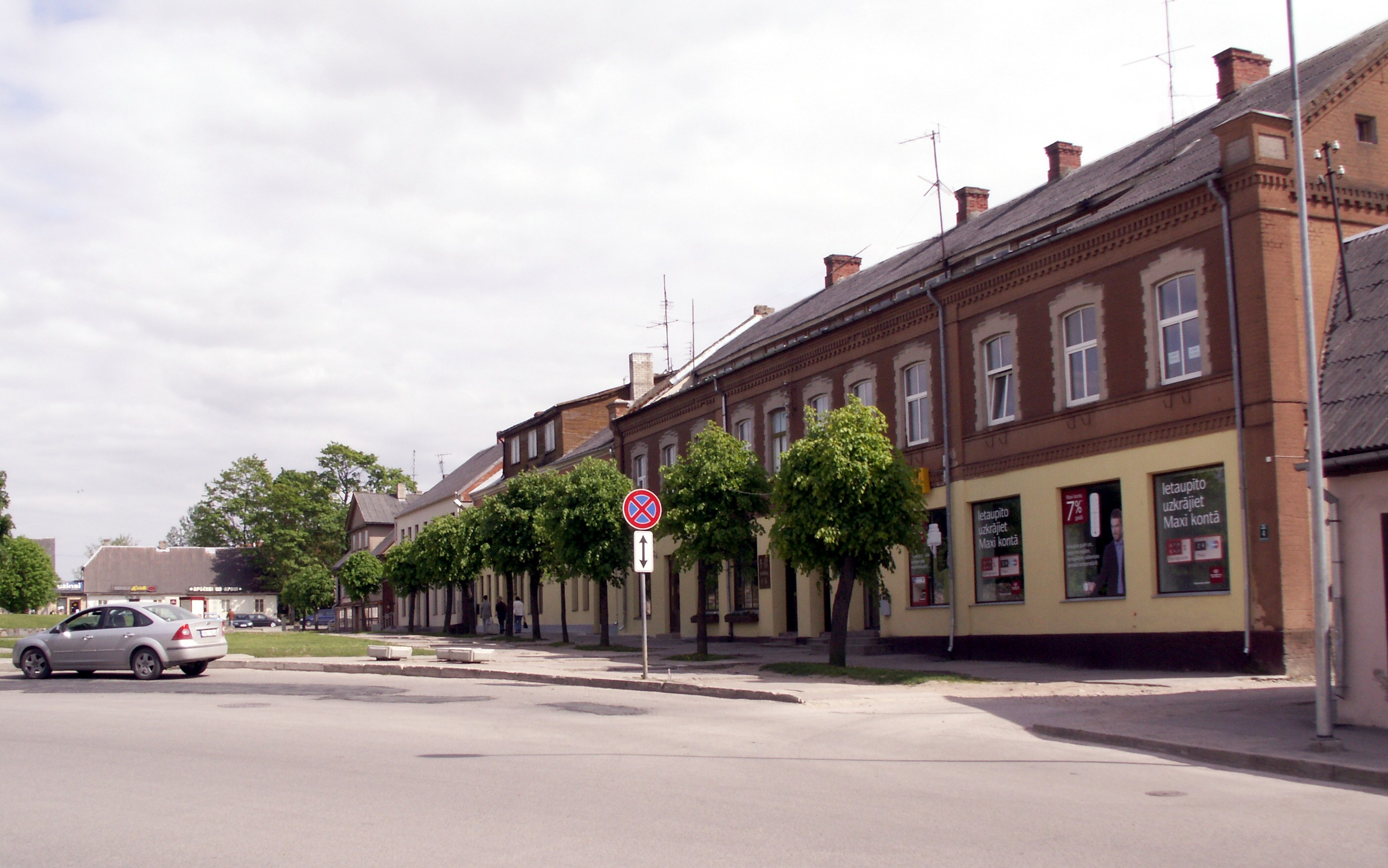 Dobele, Latvija, markt place